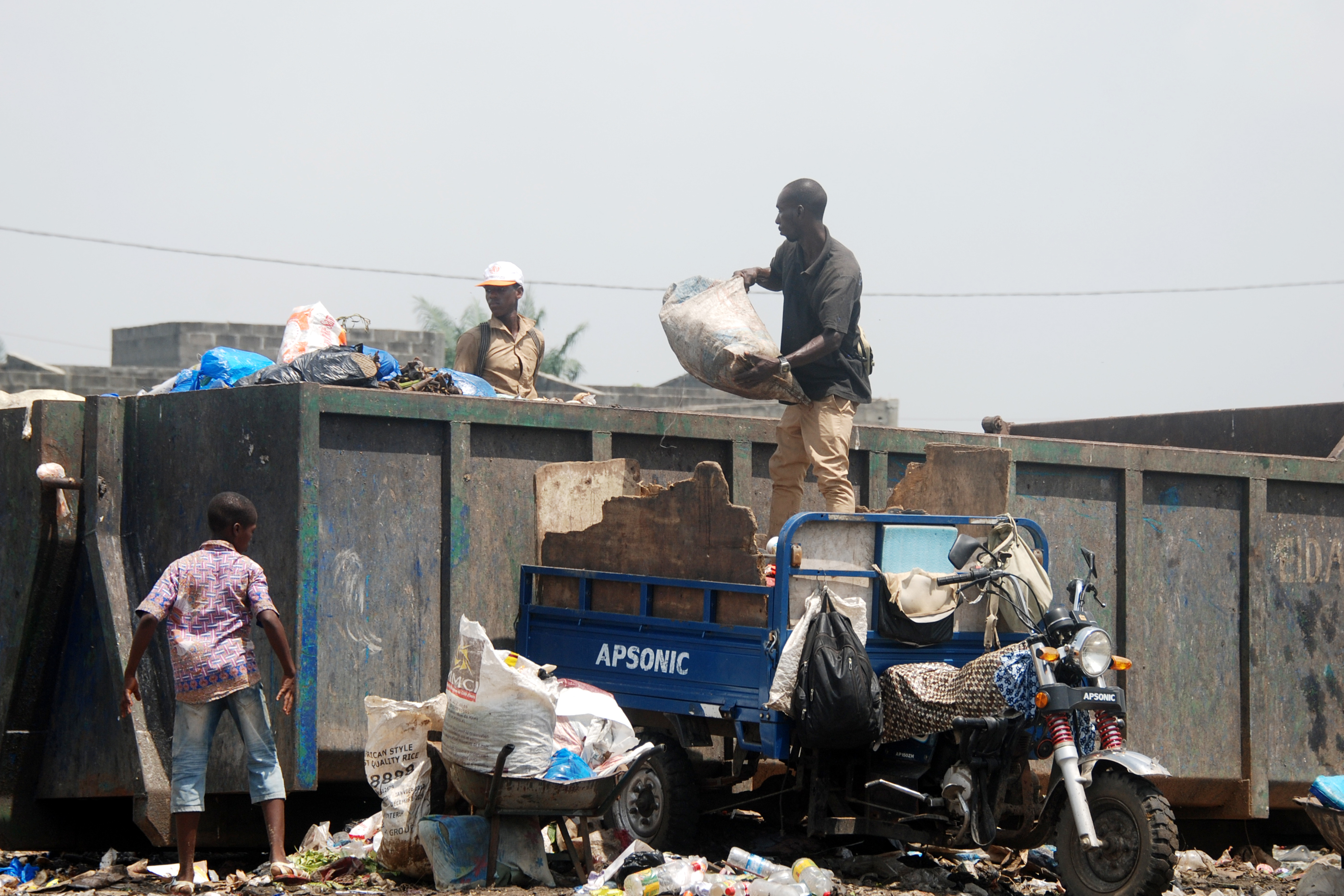 un ramasseur d'ordures vidant sa charge à Abidjan This is an image of "African people at work" from Ivory Coast